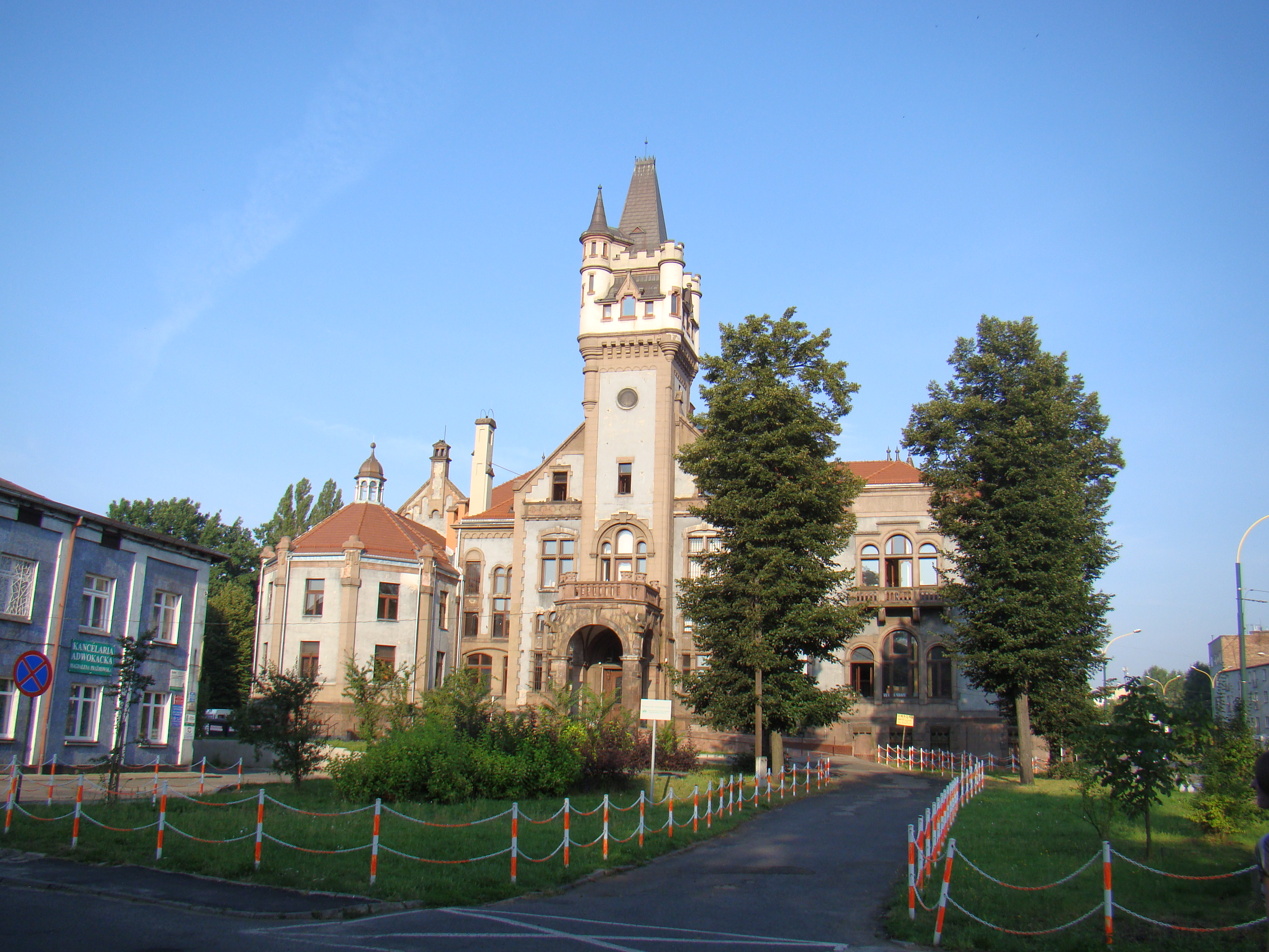 Sosnowiec, pałac Schöna, ob. sąd rejonowy, po 1870